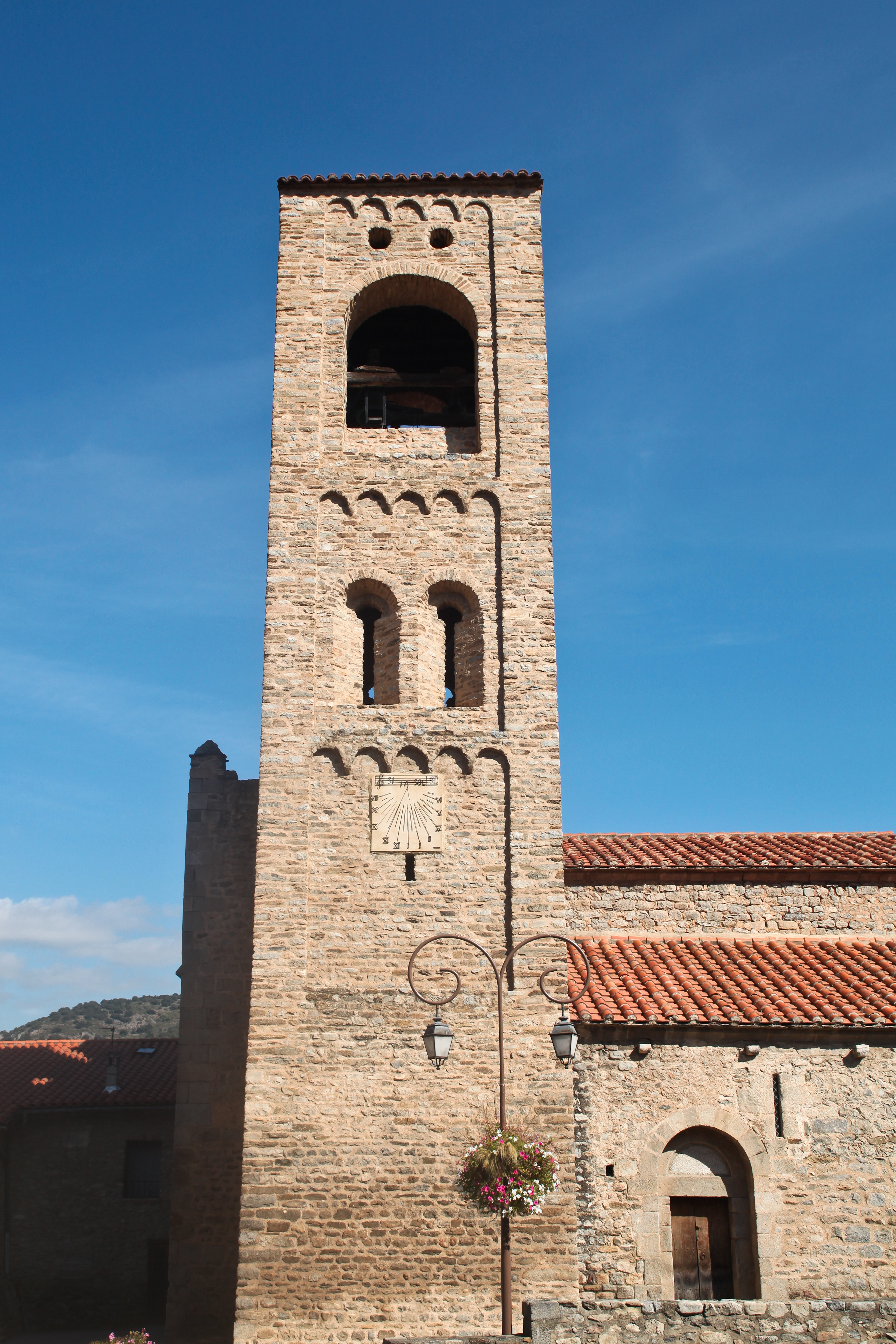 Église Sainte-Marie de Corneilla-de-Conflent, le clocher